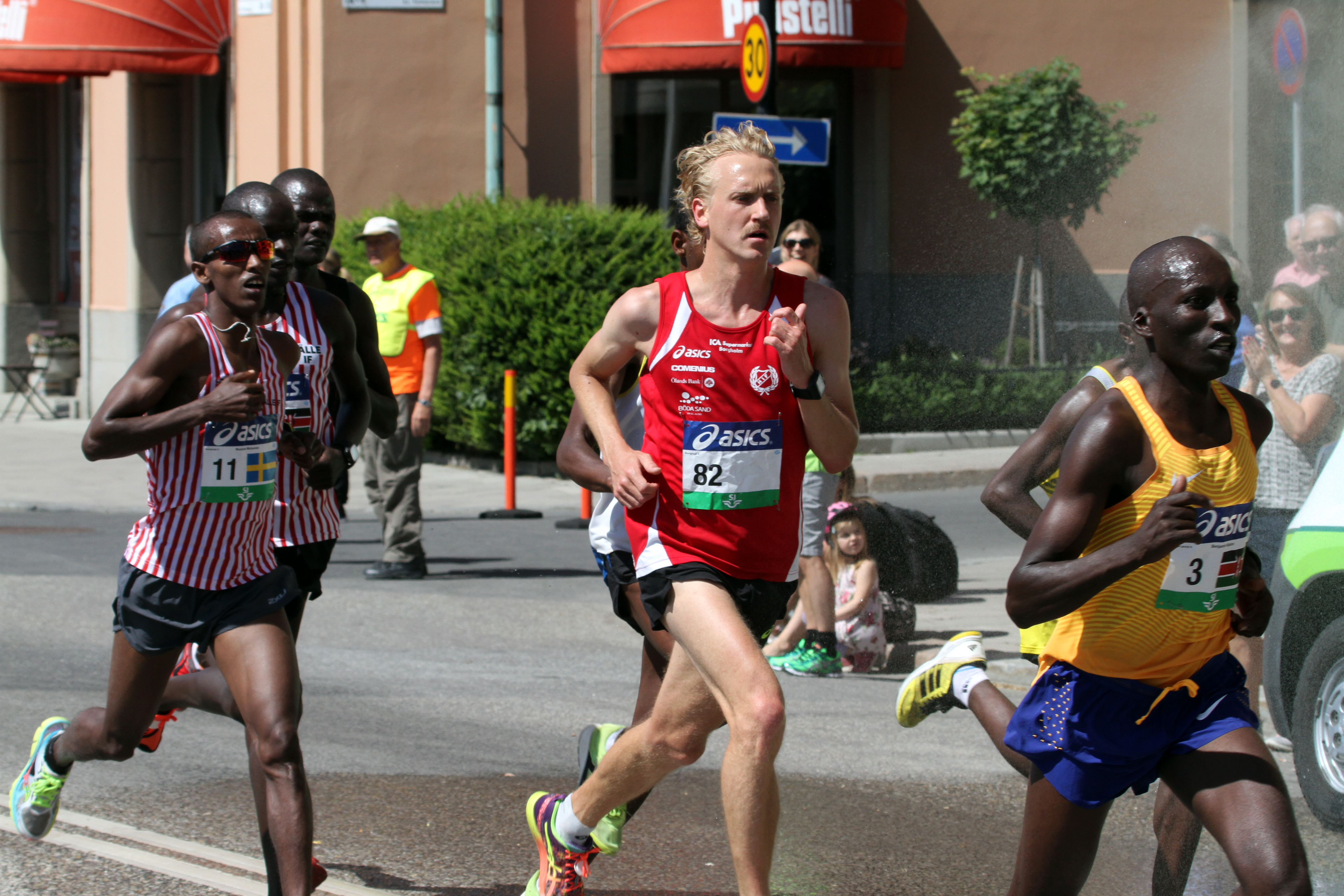 Stockholm Marathon 2016. 3: Benjamin Kiptoo, Kenya 11: Mustafa Mohamed, Sweden 82: David Nilsson, Sweden